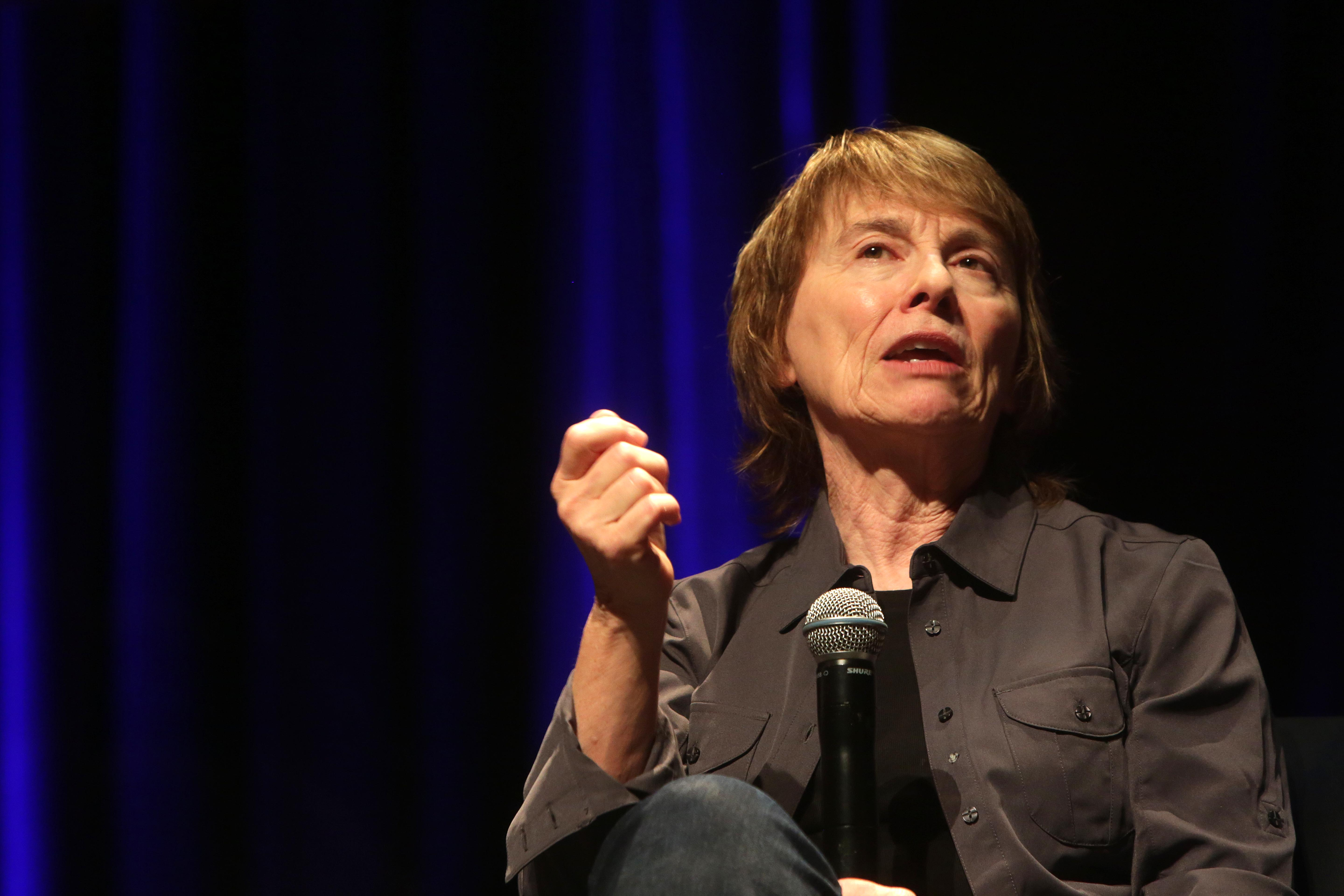 Convidado: Camille Paglia, escritora norte-americana Data: 16 de setembro de 2015 Local: Teatro Cetip – São Paulo Crédito: Greg Salibian